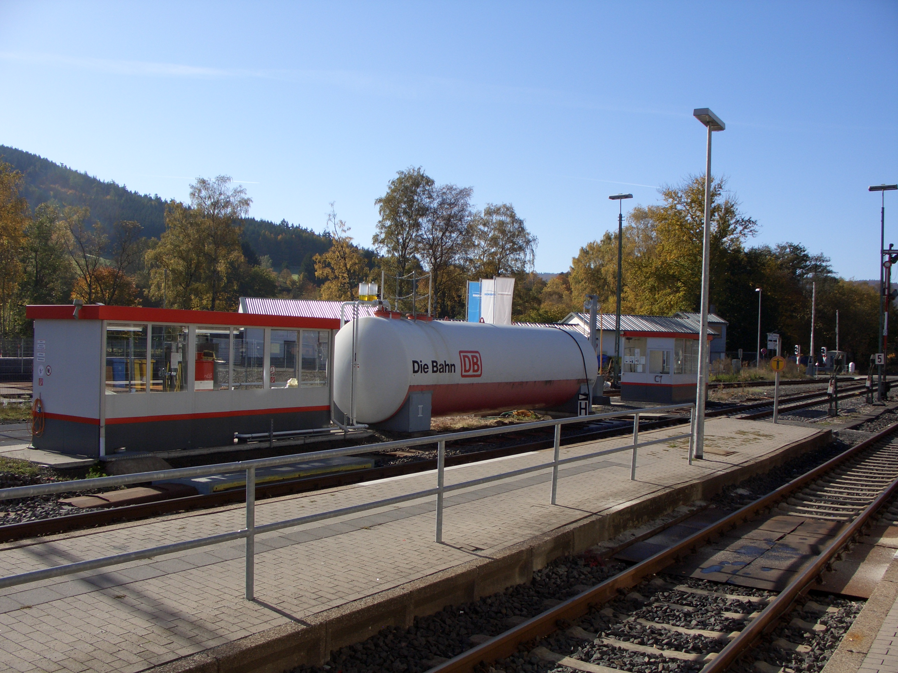 Die Triebwagentankstelle im Bahnhof Bad Laasphe (2012)